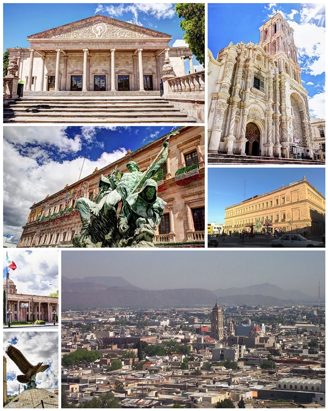 Montaje de imágenes de Saltillo. De arriba a abajo de izquierda a derecha: Teatro de la Ciudad Fernando Soler. Catedral de Saltillo Plaza de la Nueva Tlaxcala Palacio de Gobierno Palacio del Congreso del Estado de Coahuila Museo de las Aves de México Panorámica de la ciudad